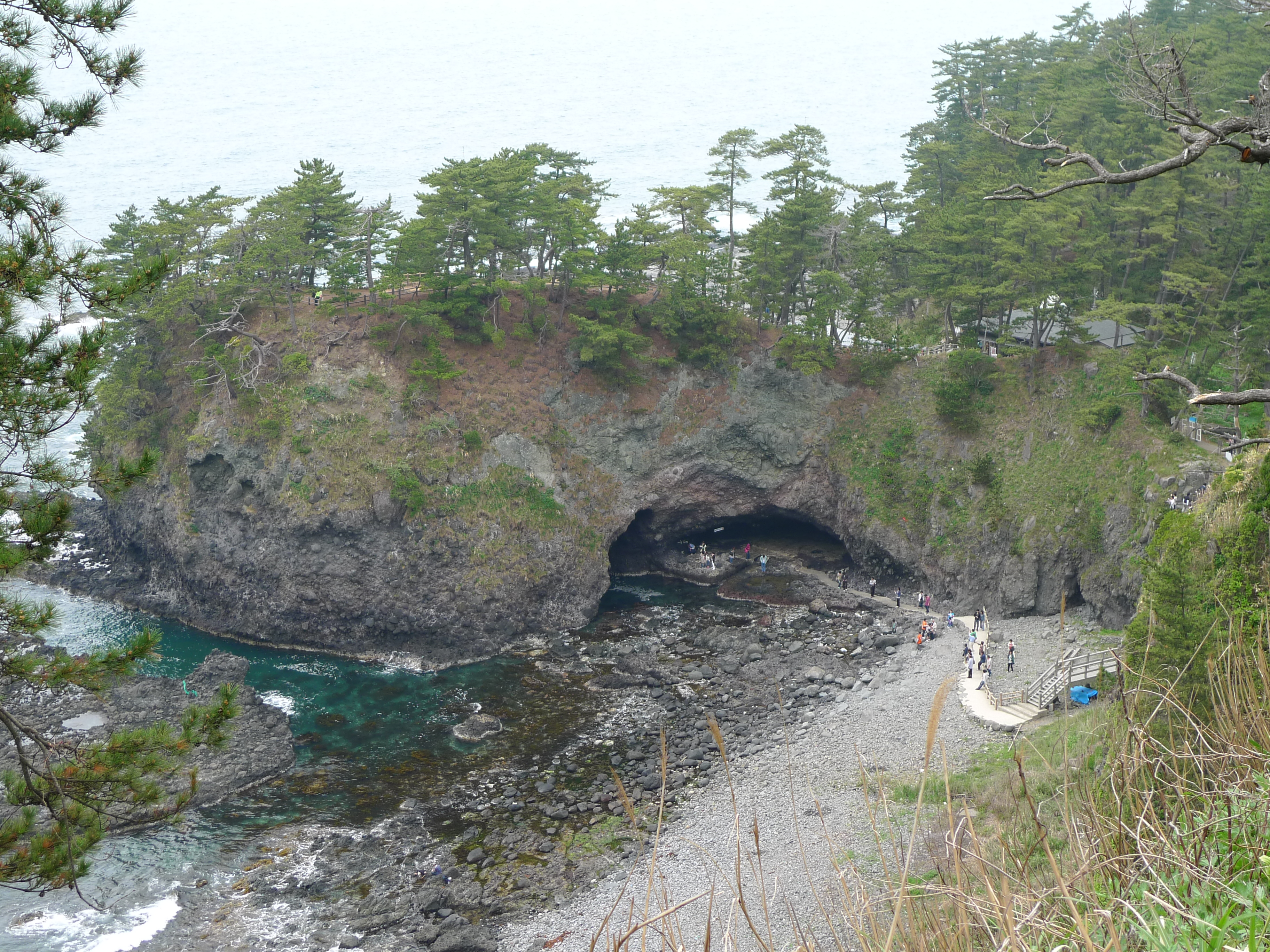 能登金剛 巌門。石川県羽咋郡